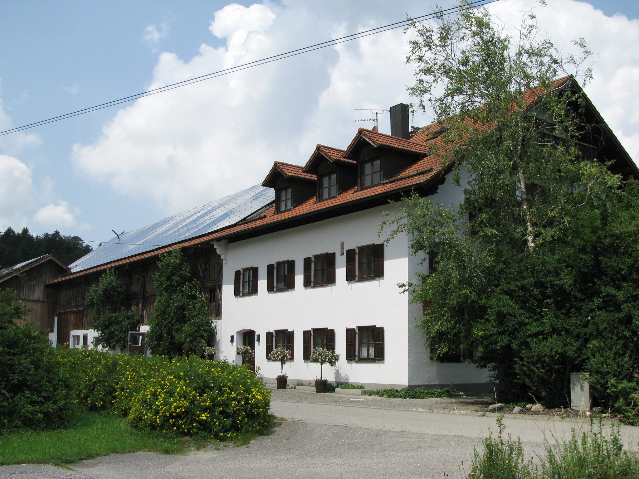 Anwesen Stillern 1, Raisting; reiches Traufbundwerk, Anfang 19. Jh. Ansicht von O - Wappentafel, bez. 1719; am Nebengebäude